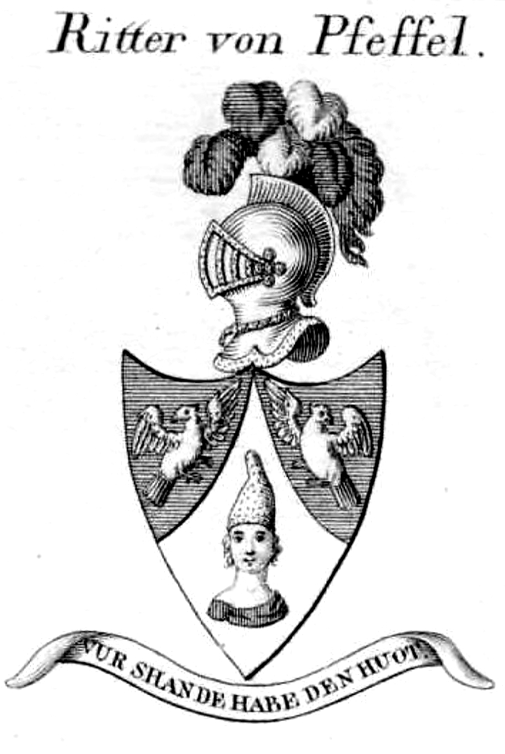 Wappen derer Ritter von Pfeffel (auch Pfeffel von Kriegelstein genannt)